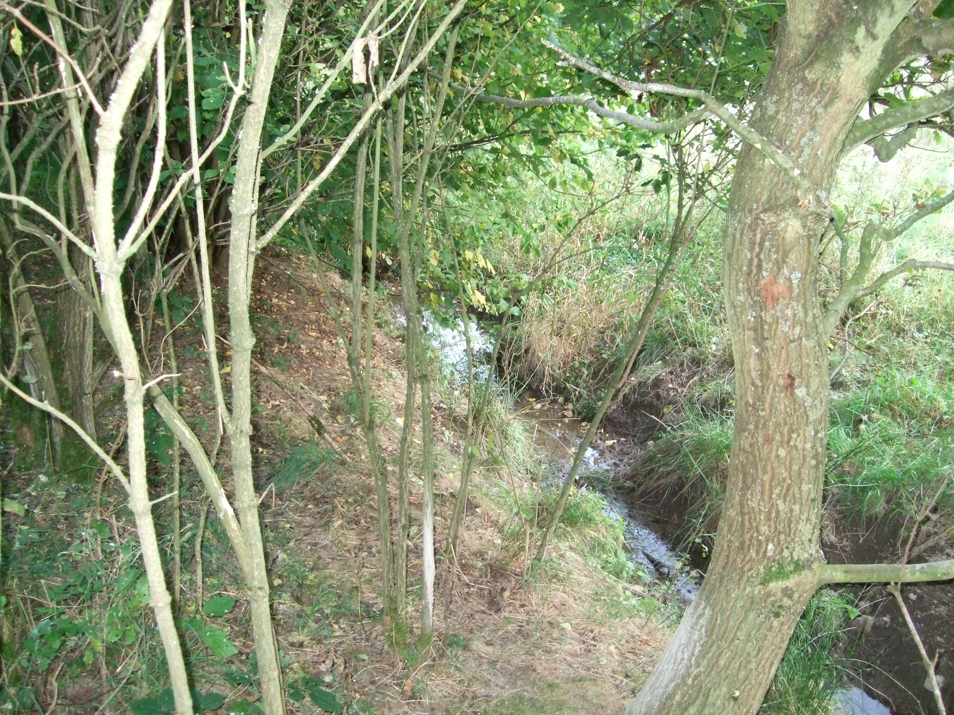 Aar ca. 250 m südlich ihrer Quelle